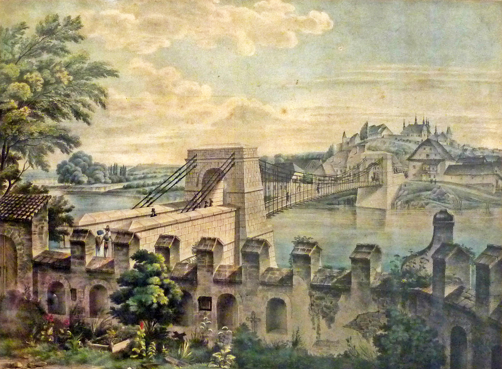 Blick über die Eger zur Stadt und ehemalige Kettenbrücke in Saaz (heute Žatec), erbaut von Friedrich Schnirch (1826)